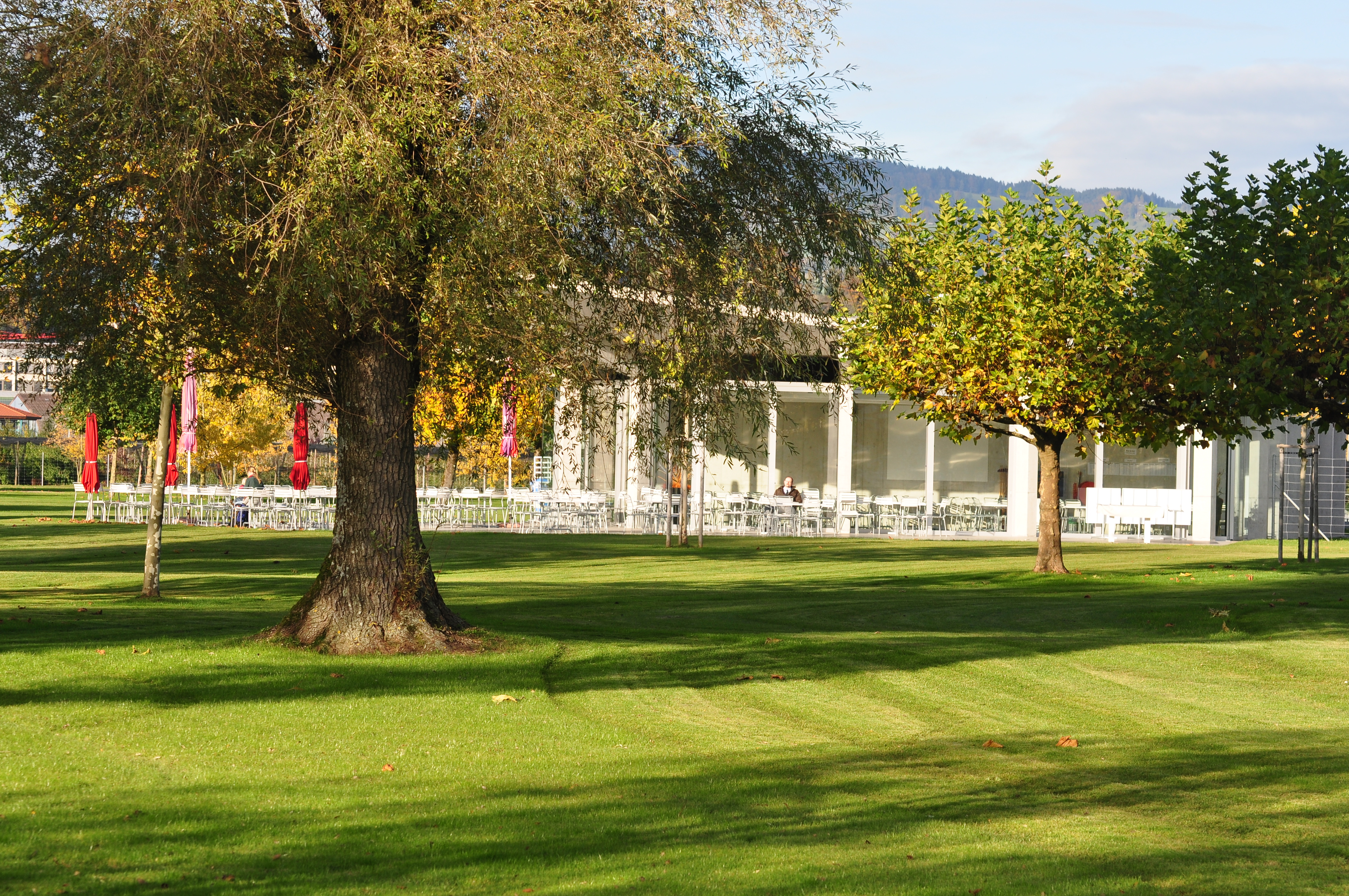 Strandbad Stampf in Jona (Switzerland)